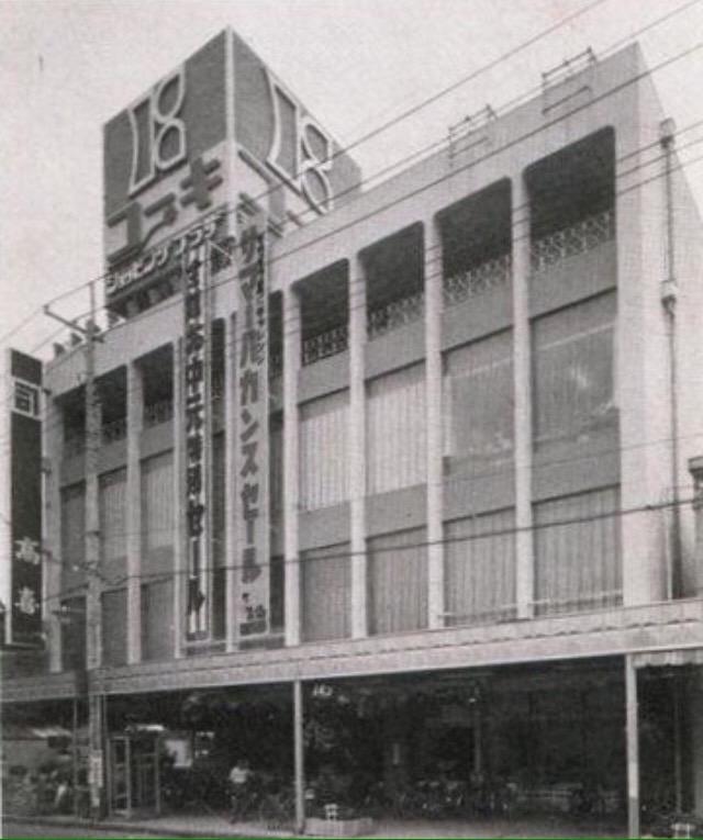 コーキ(高喜)石岡ショッピングプラザ(1980年)